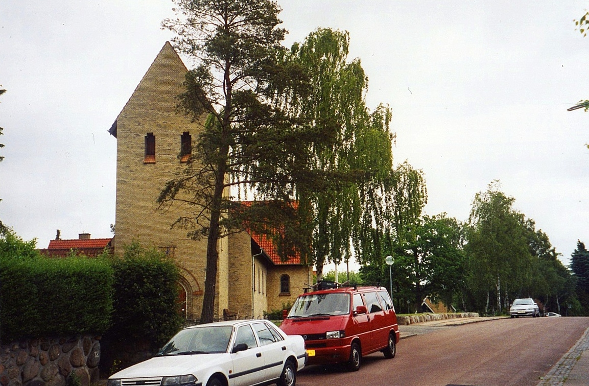 Virum Kirke, Virum Sogn, Lyngby-Taarbæk Kommune